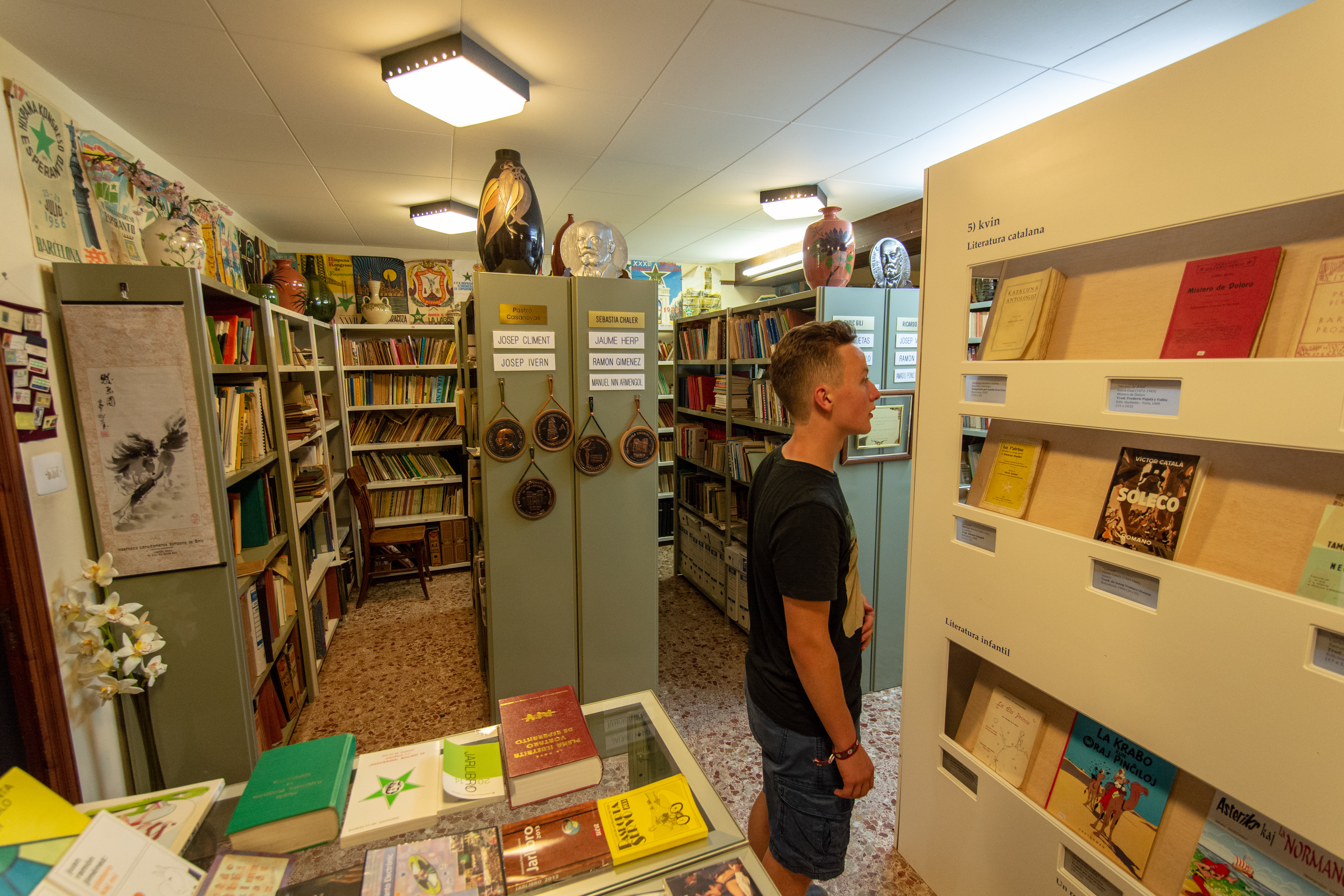 Vizito de la Esperanto-muzeo de Subirats dum la SAT-Kongreso 2019